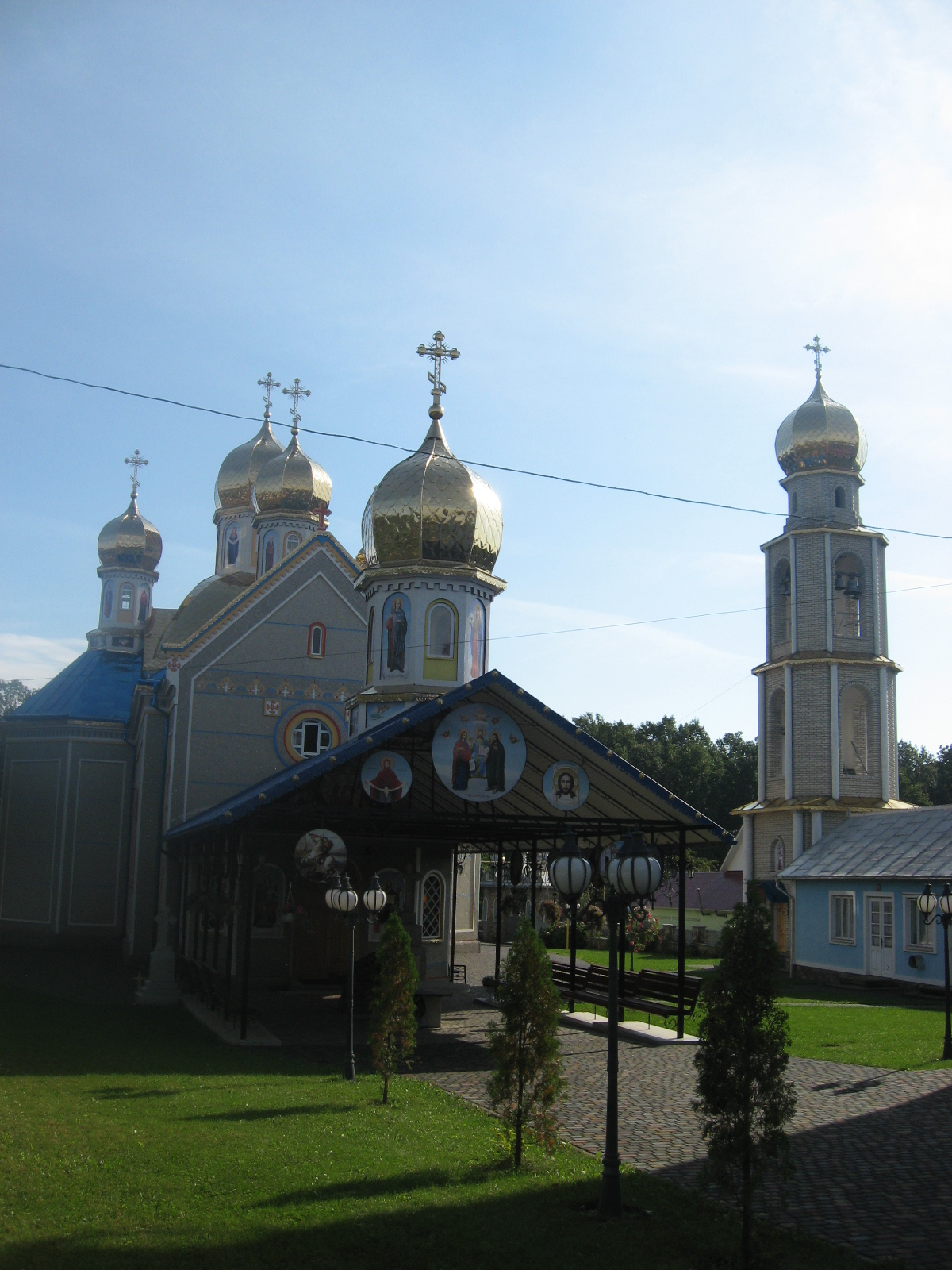 Дмитрівська церква та дзвіниця (мур.), с. Тисовець